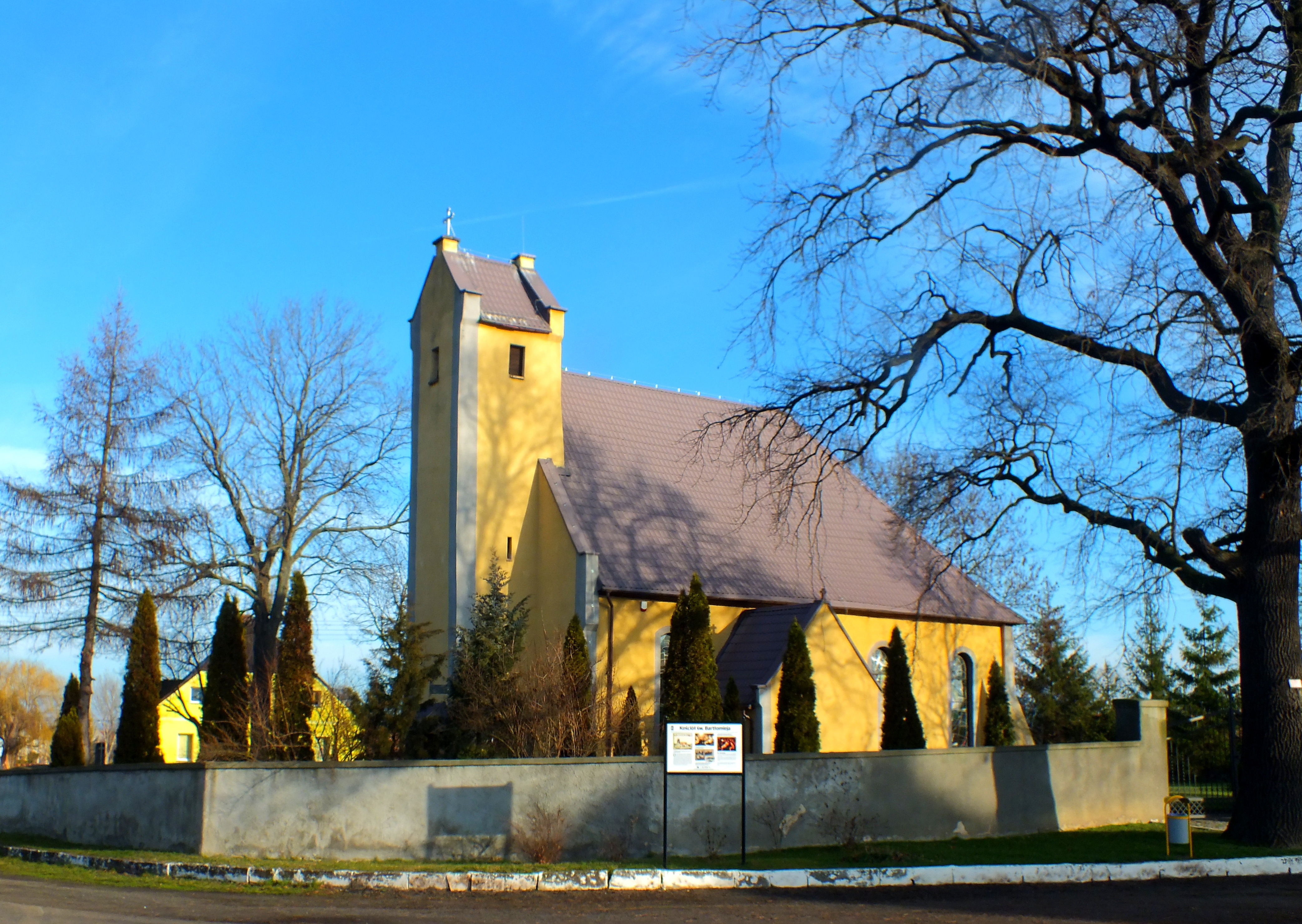 Nowa Wieś Legnicka, kościół pw. św. Bartłomieja Wikidata has entry Q30050852 with data related to this item.